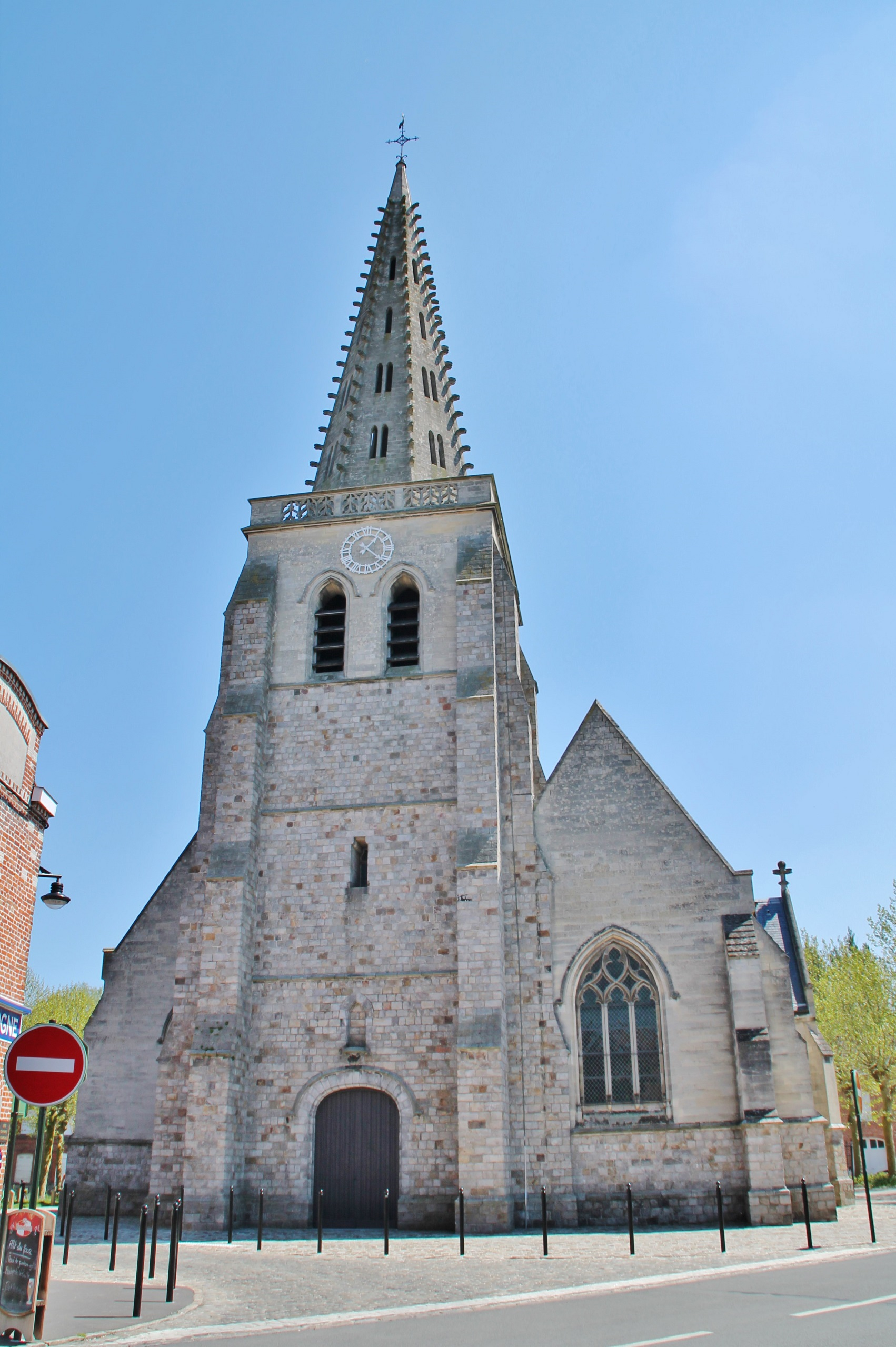 L'église